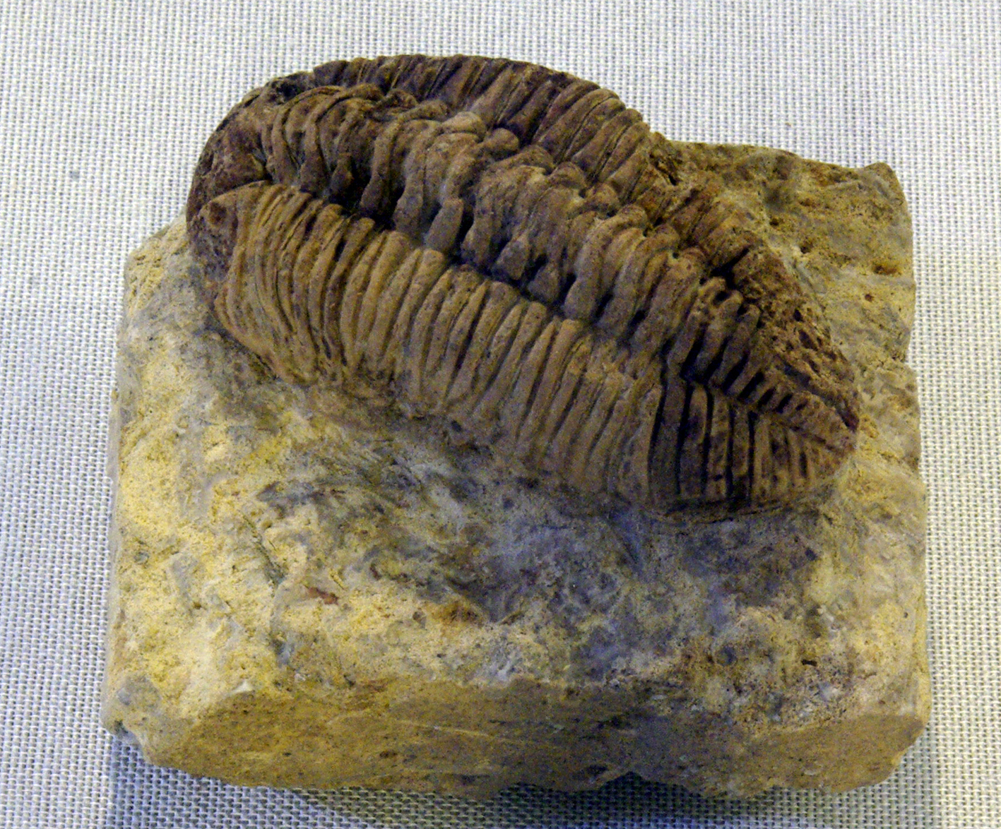 Trilobit Chasmops, Sammlung Phillipsen, Flensburg